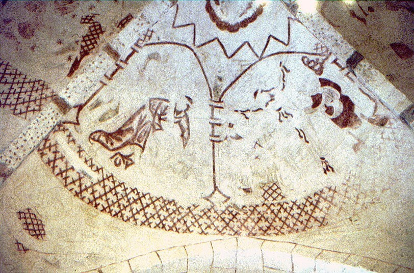 Sigerslevvester Kirke i Danmark. Korsbæring og Korsfæstelse